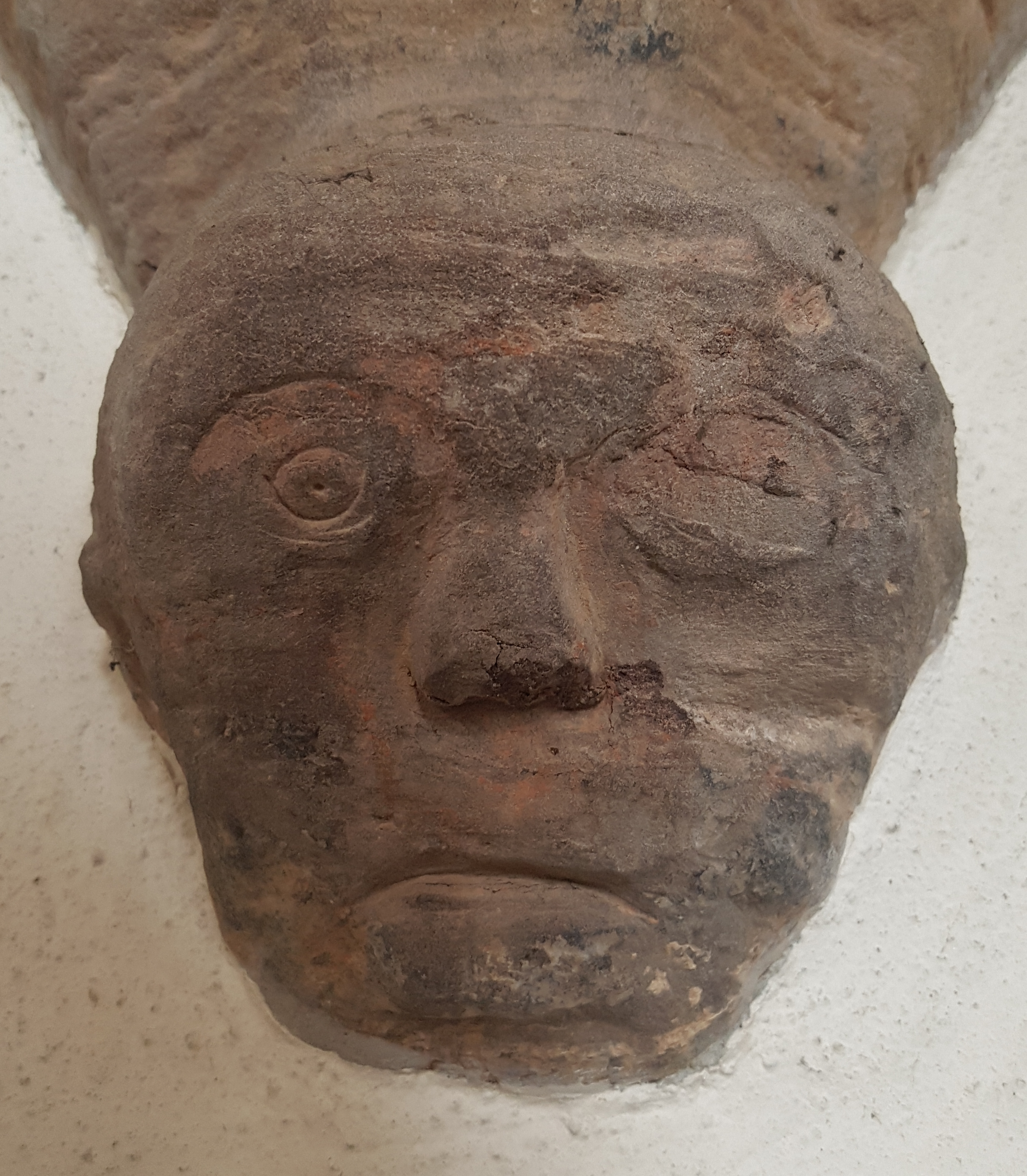 Ditzingen, Speyrer Kirche, Detail an der Kanzel (Engelskopf)